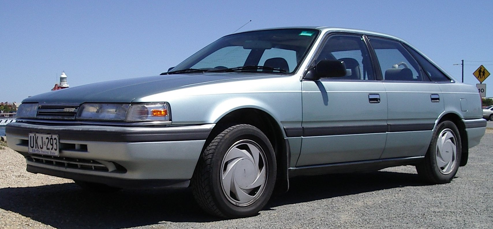 1988 Mazda 626 Turbo